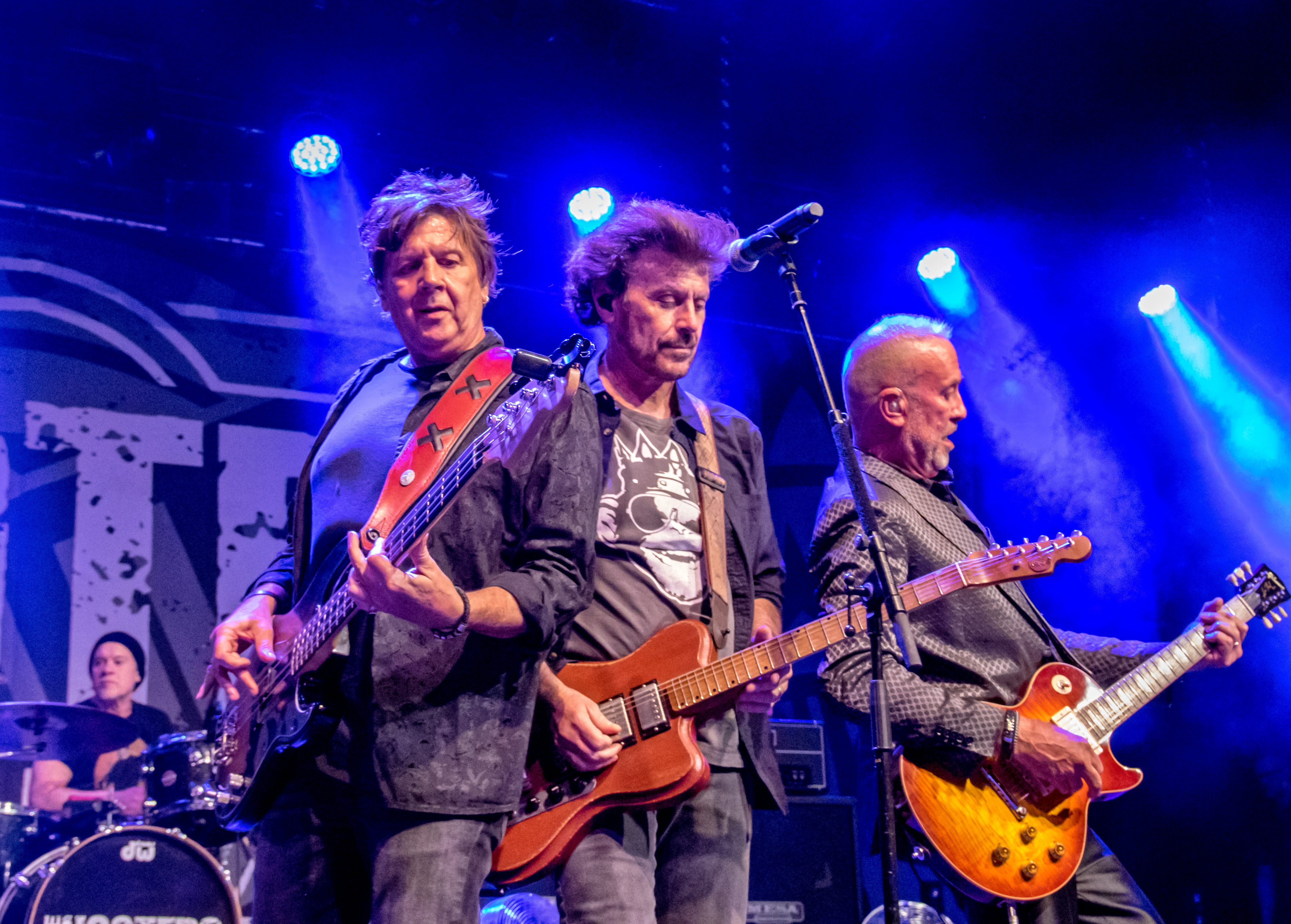 Bilder vom Zelt Musik Festival 2018 in Freiburg im Breisgau Auftritt The Hooters am 26. Juli 2018 im Zirkuszelt